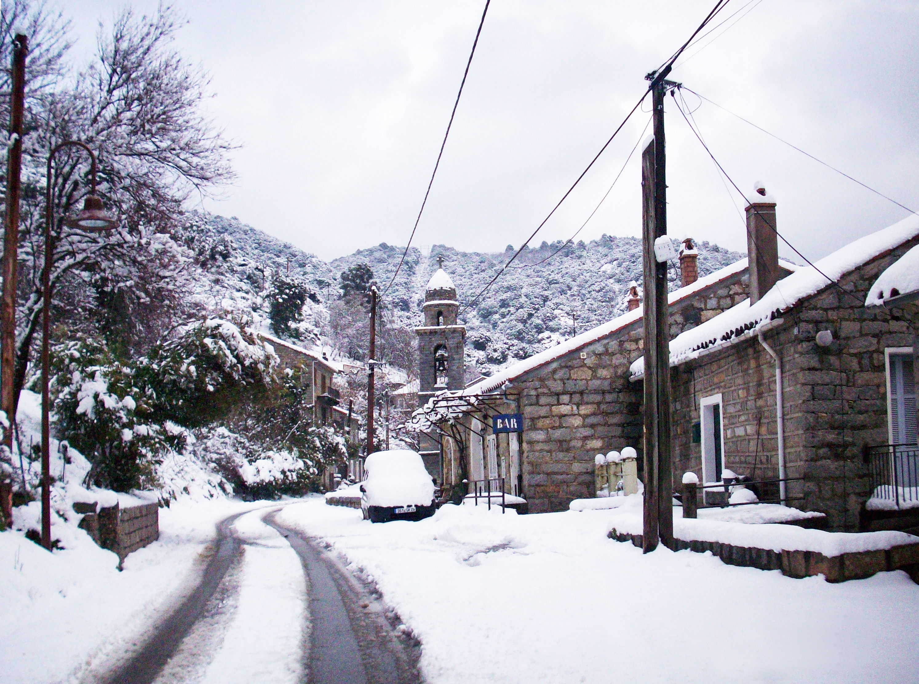 Cargiaca sous la neige